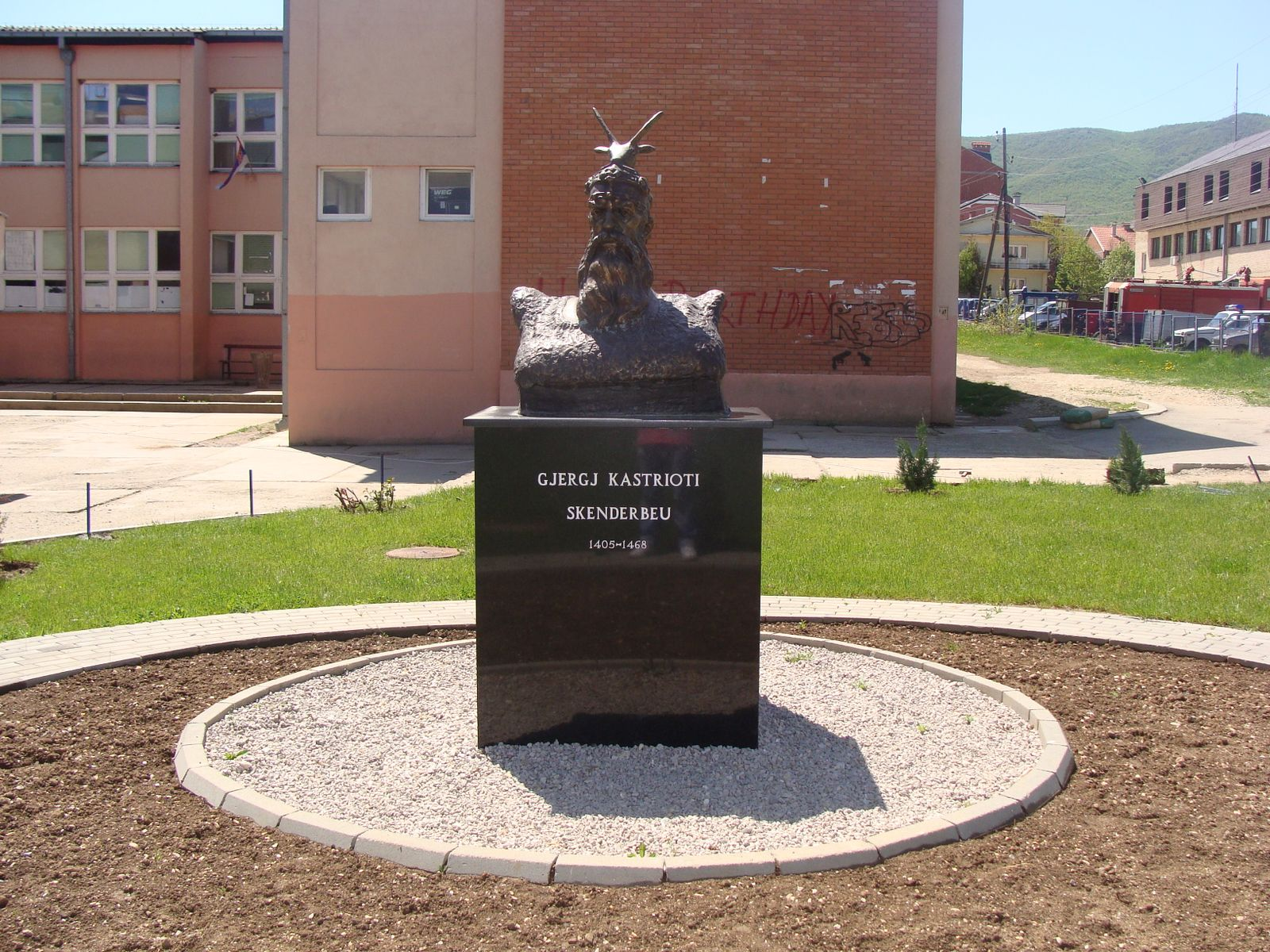 Gjergj Kastrioti Skendrbeu në Preshevë